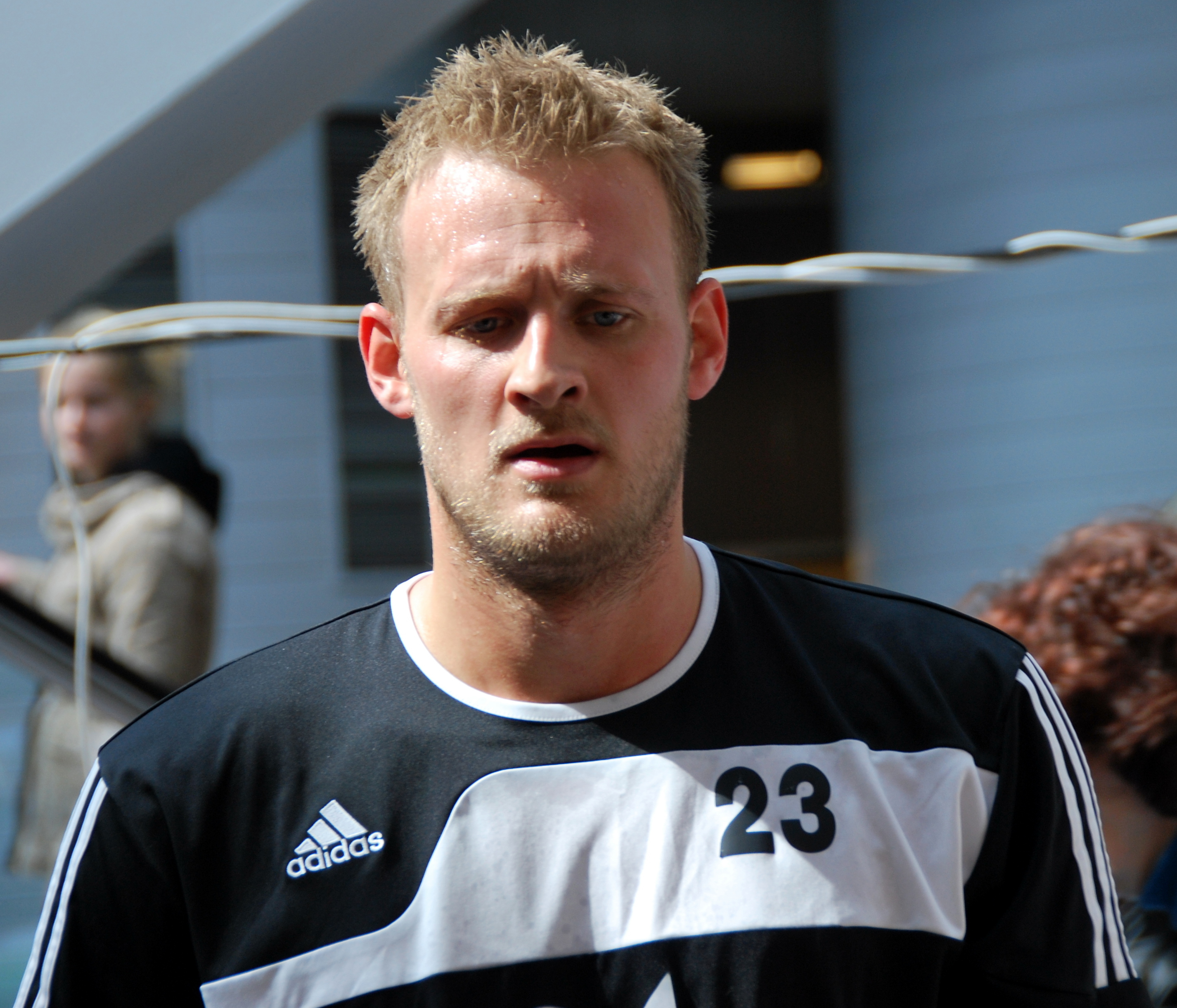 Håndboldspilleren Simon Kristiansen fra Bjerringbro-Silkeborg.